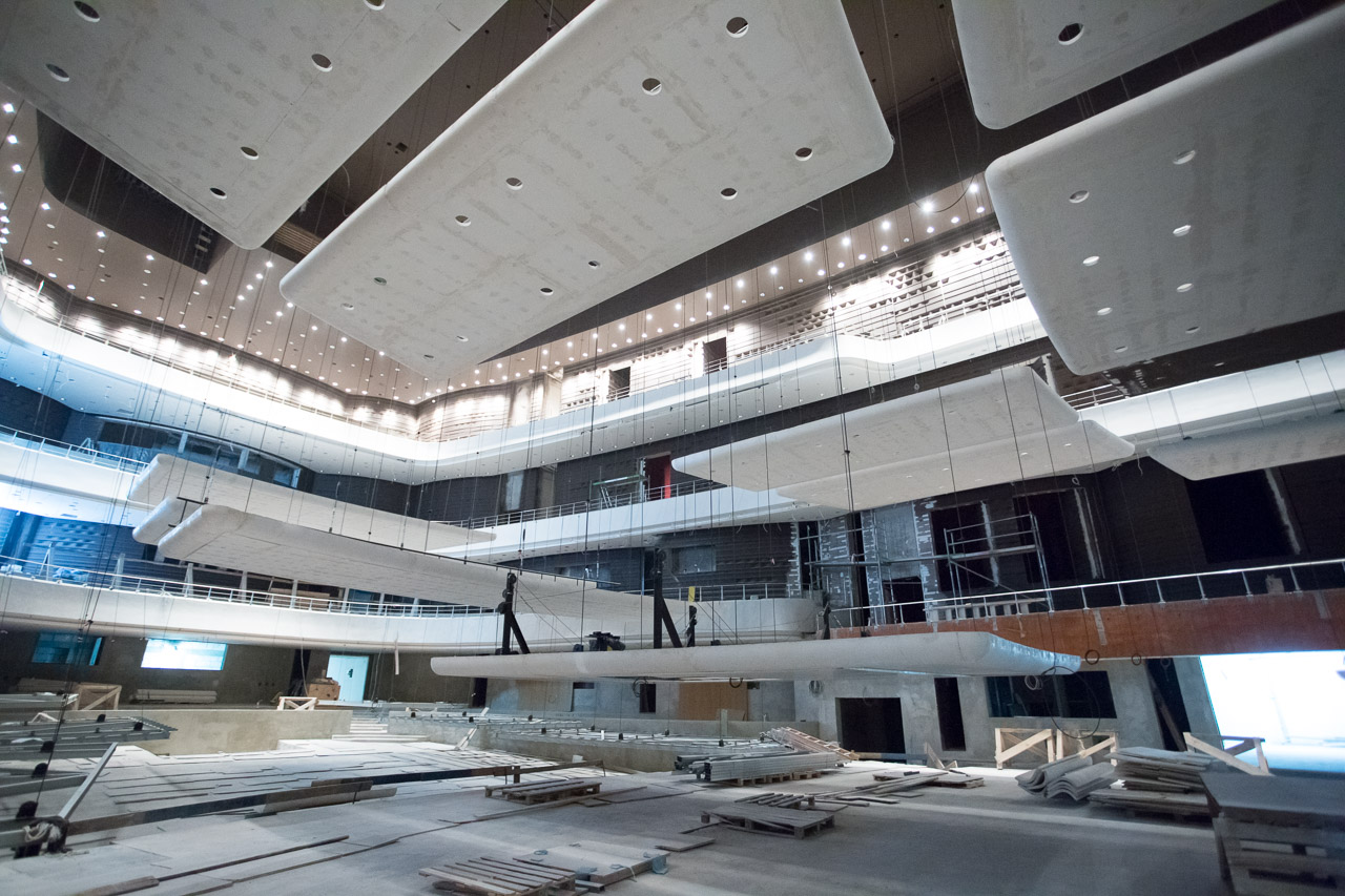 Główna sala koncertowa Narodowego Forum Muzyki